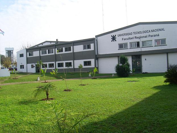 Universidad Tecnológica Nacional - Facultad Regional Paraná